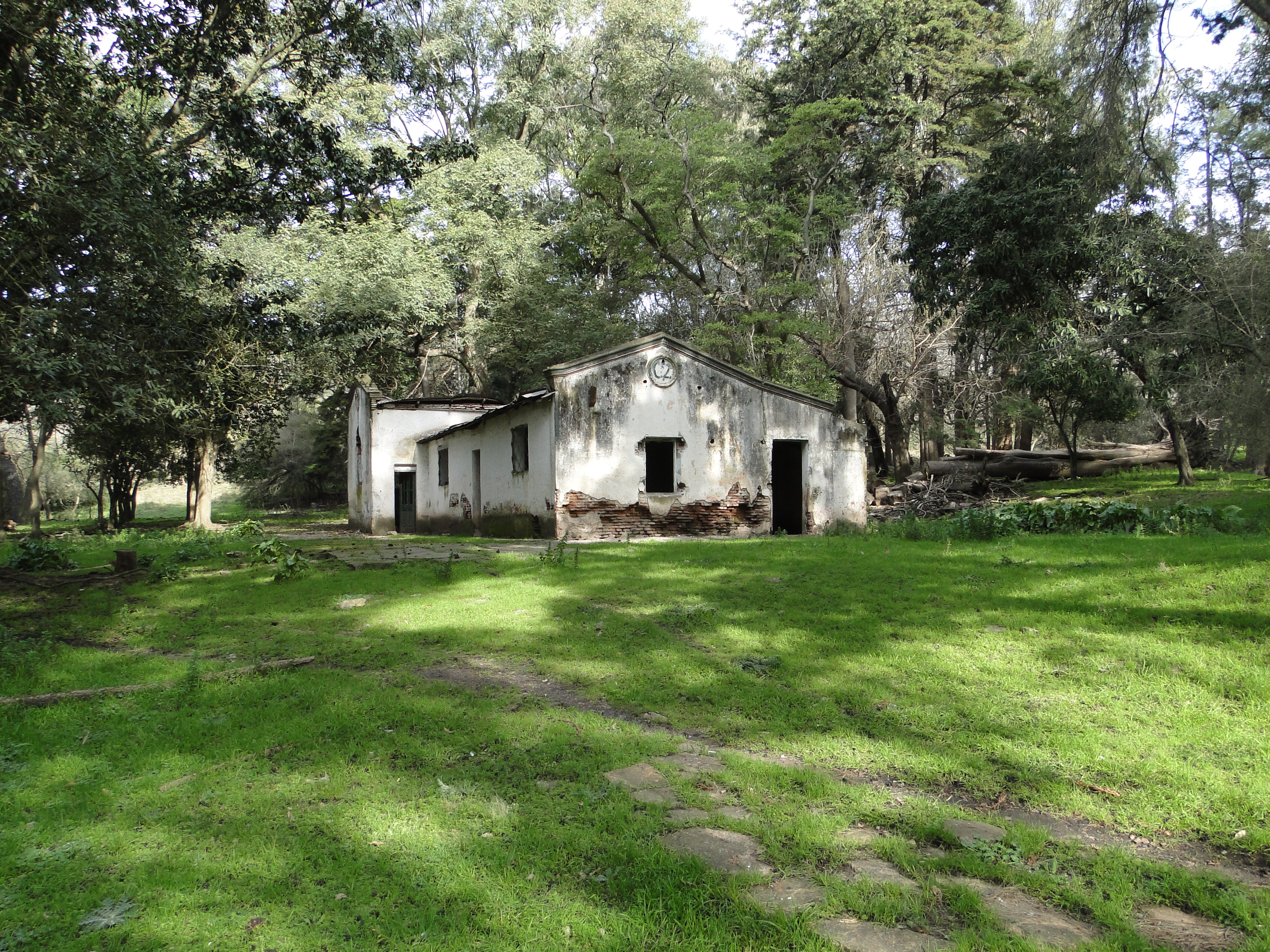 Casco Viejo "Monte Peloni"